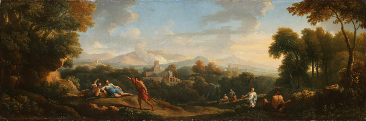 Палатно, алей. 80х241,8